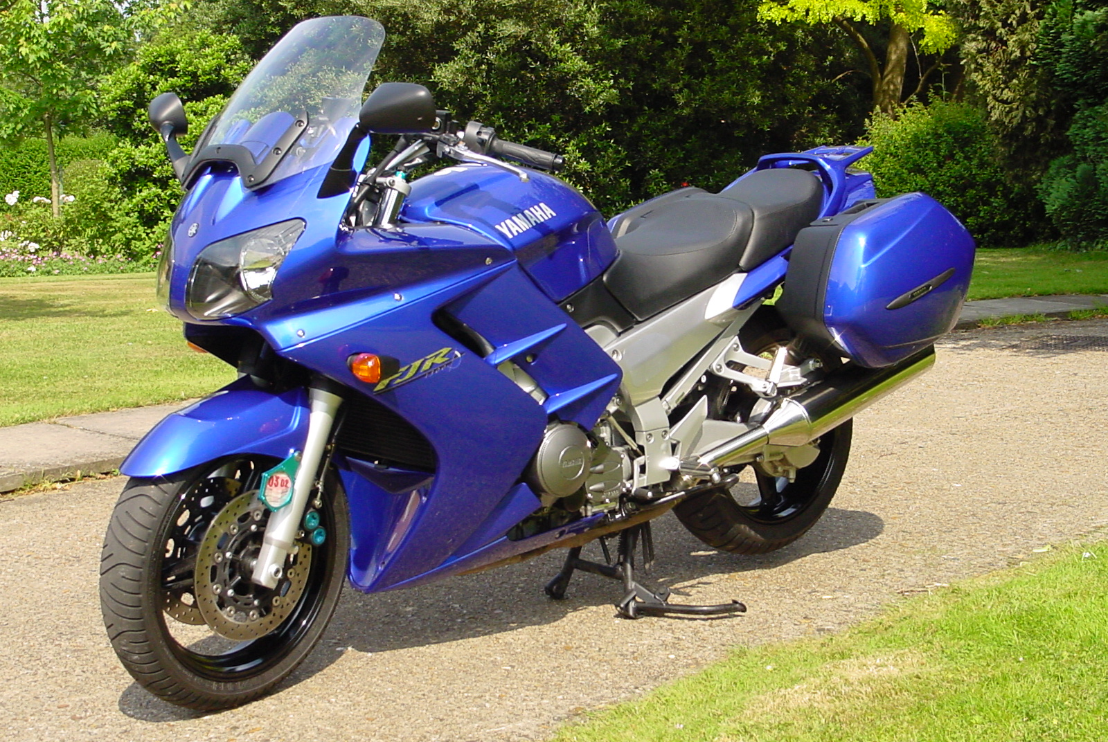 Yamaha FJR1300